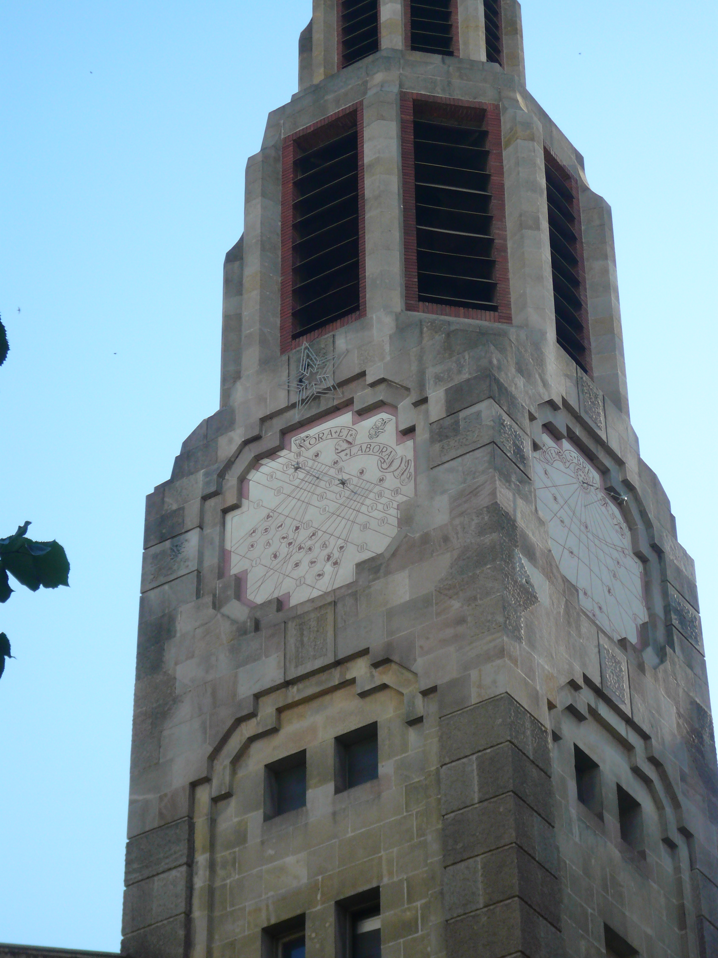 Rellotges de sol de l'església dels Àngels, a la cantonada de carrer Balmes i carrer València de Barcelona. Fotografia feta des del carrer.